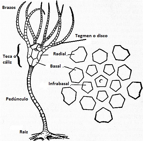 Adaptación al español de imagen de E. Británica